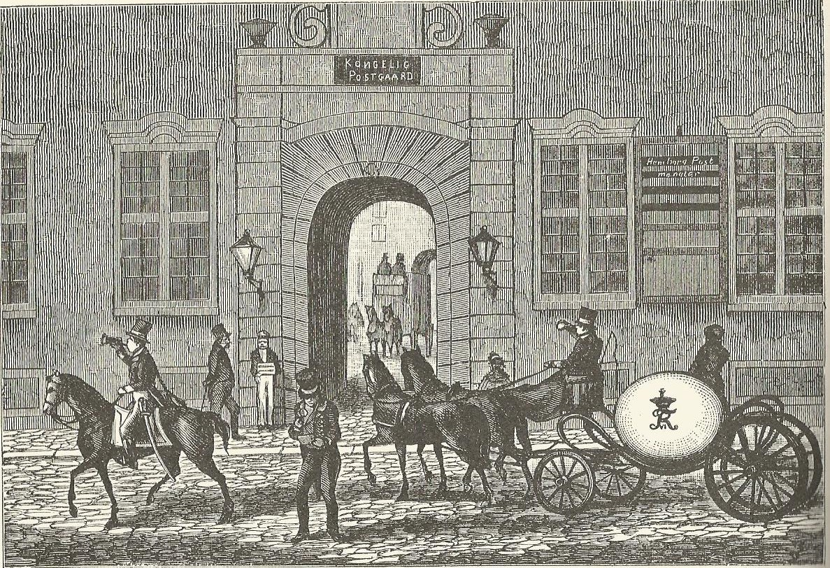 Peter C.N. Klæstrup: Kugleposten kører ind på postgården i Købmagergade (bogtryk)